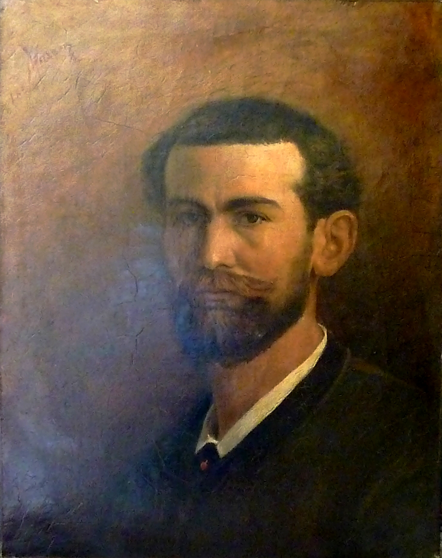 portrait de Victor Masson réalisé par lui-même.